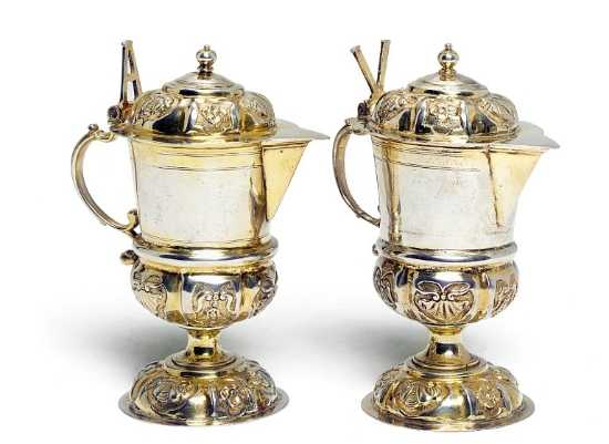 Zwei deutsche kleine Messkännchen, teilvergoldet, für Wasser "A" gekennzeichnet, das andere mit einem "V" für Wein, runden Basen bestimmt. Maker Joseph Ignaz Saler 1738-1764, Augsburg townmark 1743-1745